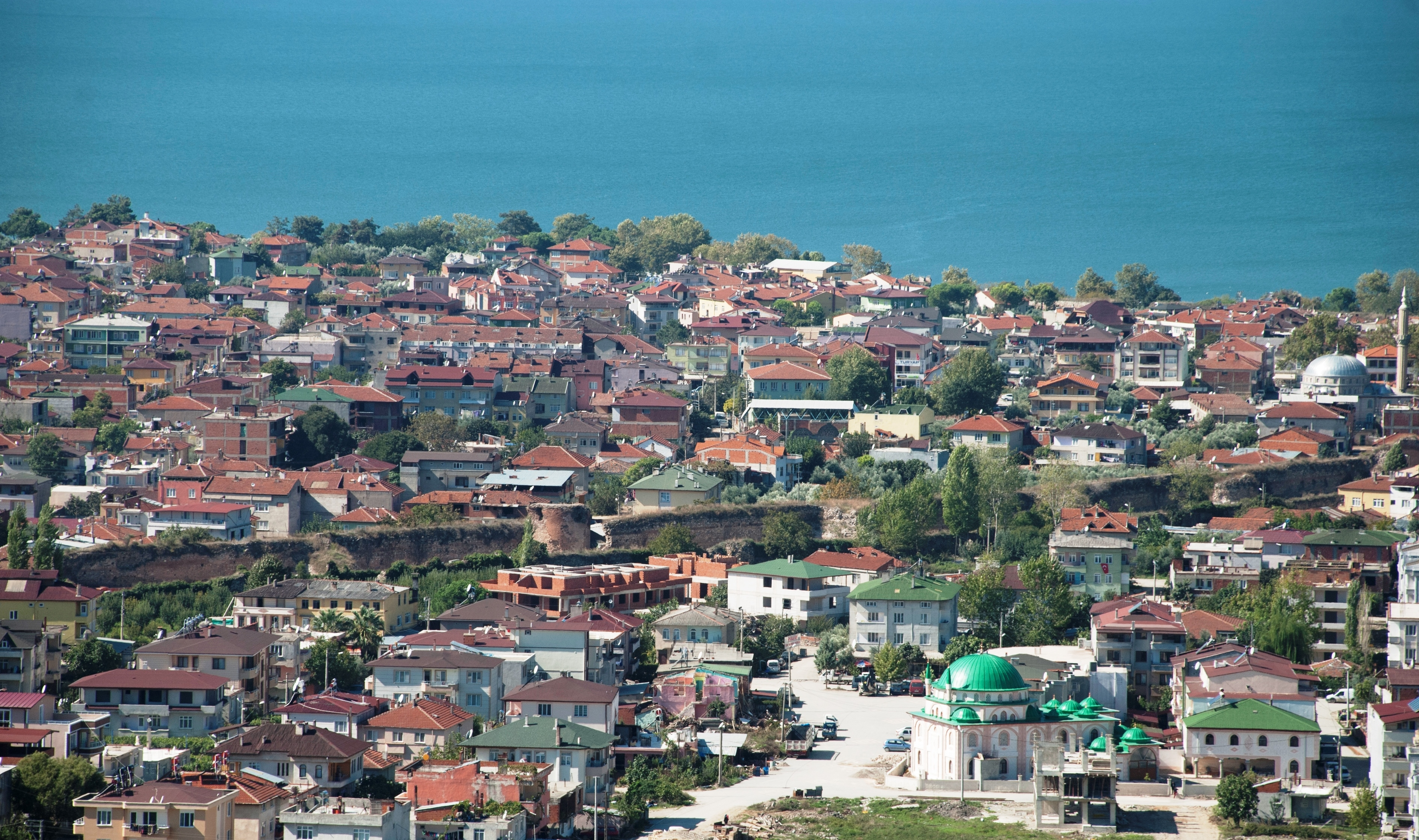 İznik şehir merkezini bölen surlar